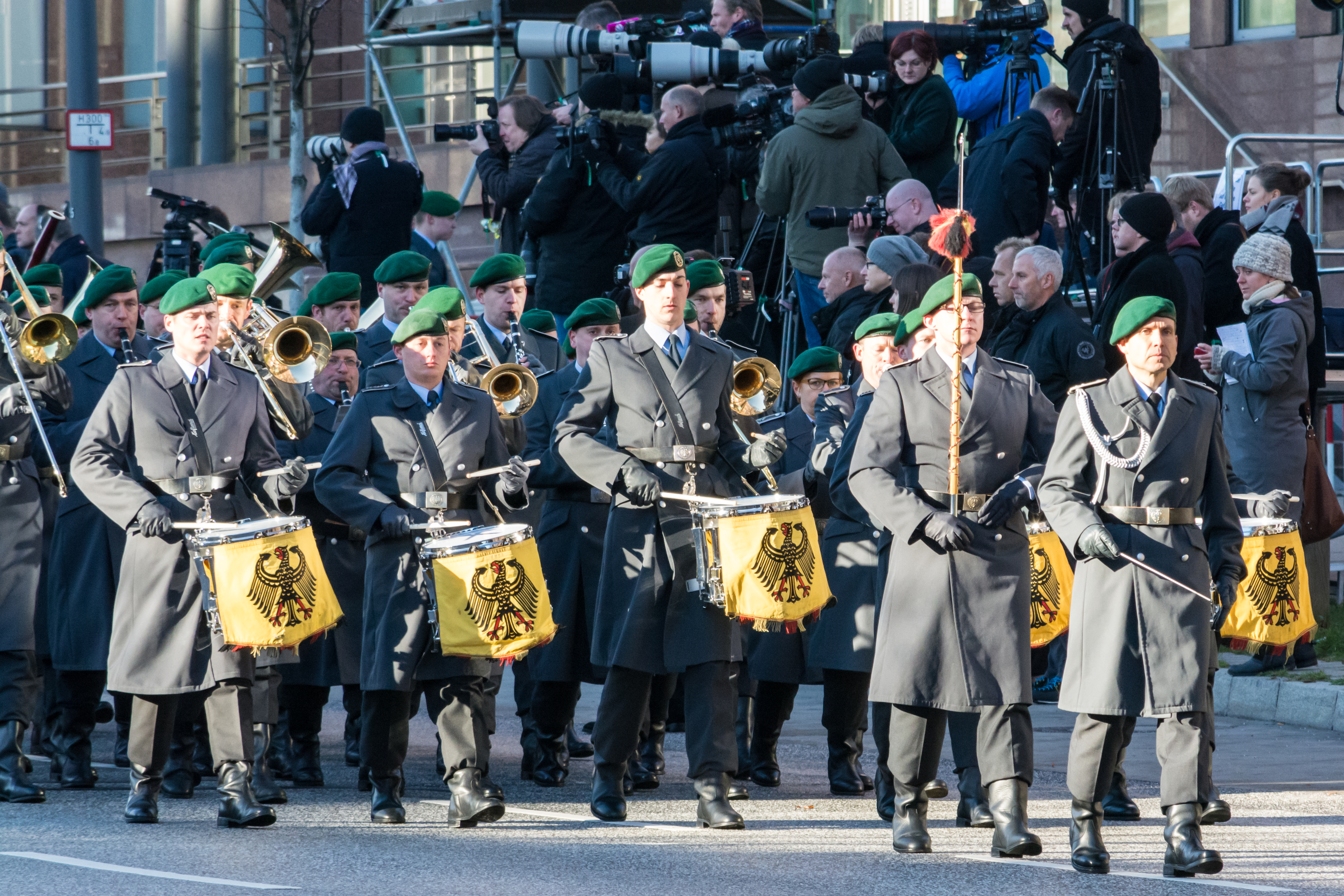 Soldaten des Stabsmusikkorps und des Wachbataillons der Bundeswehr auf der Ludwig-Erhard-Straße in Hamburg-Neustadt beim Abmarsch nach dem Großen Ehrengeleit im Rahmen des Staatsakts für Helmut Schmidt.